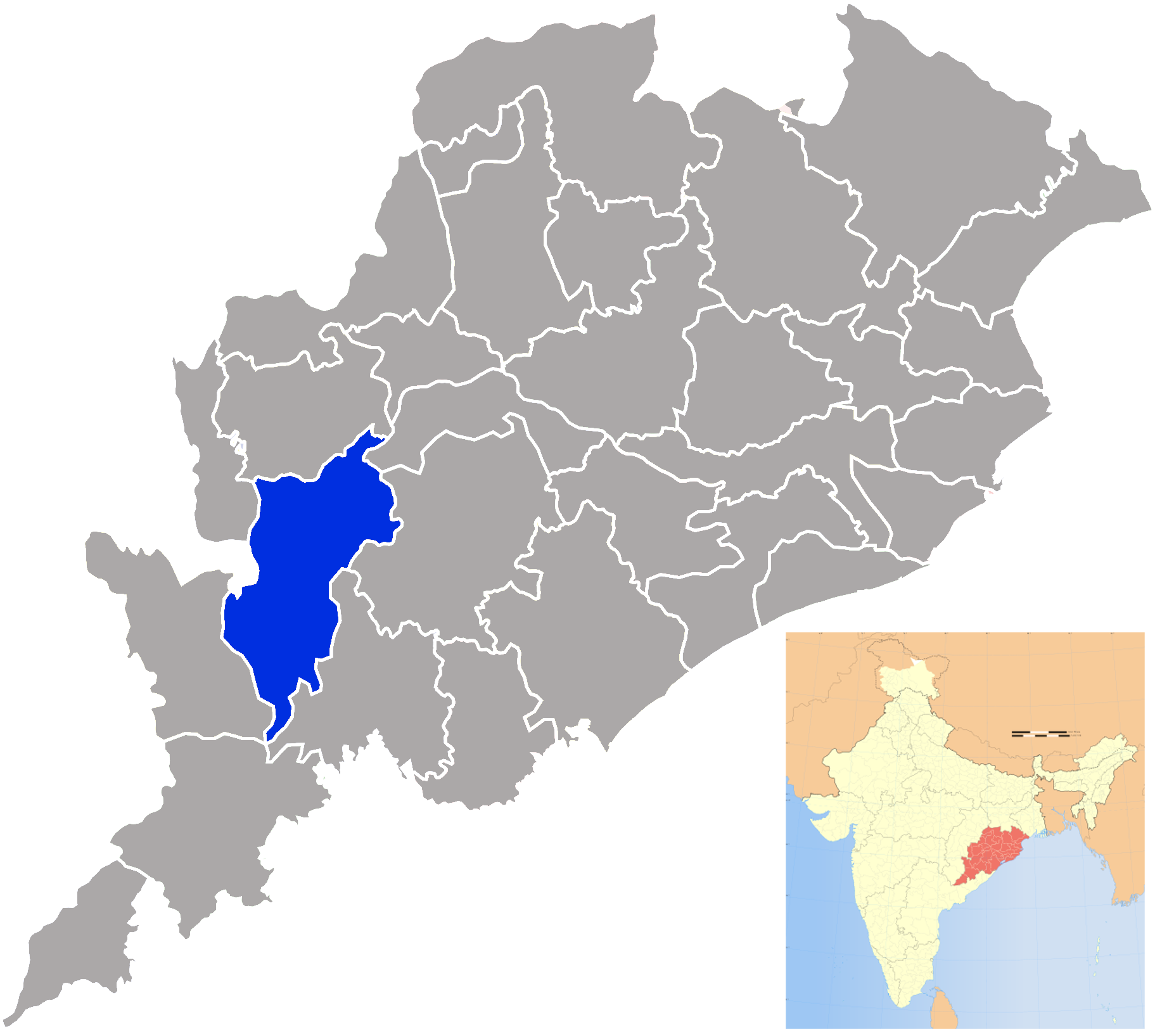 Distrito de Kalahandi en Orissa